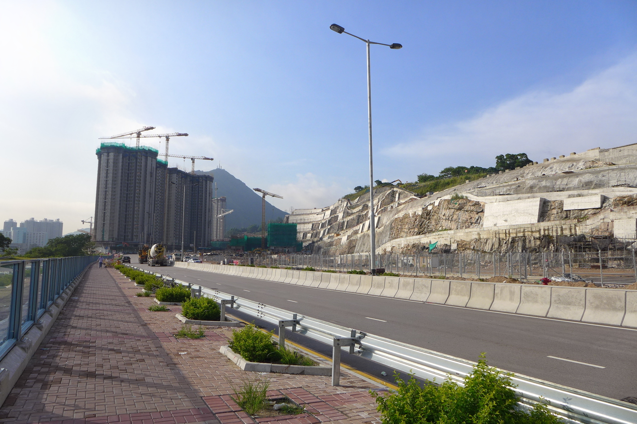 On Sau Road